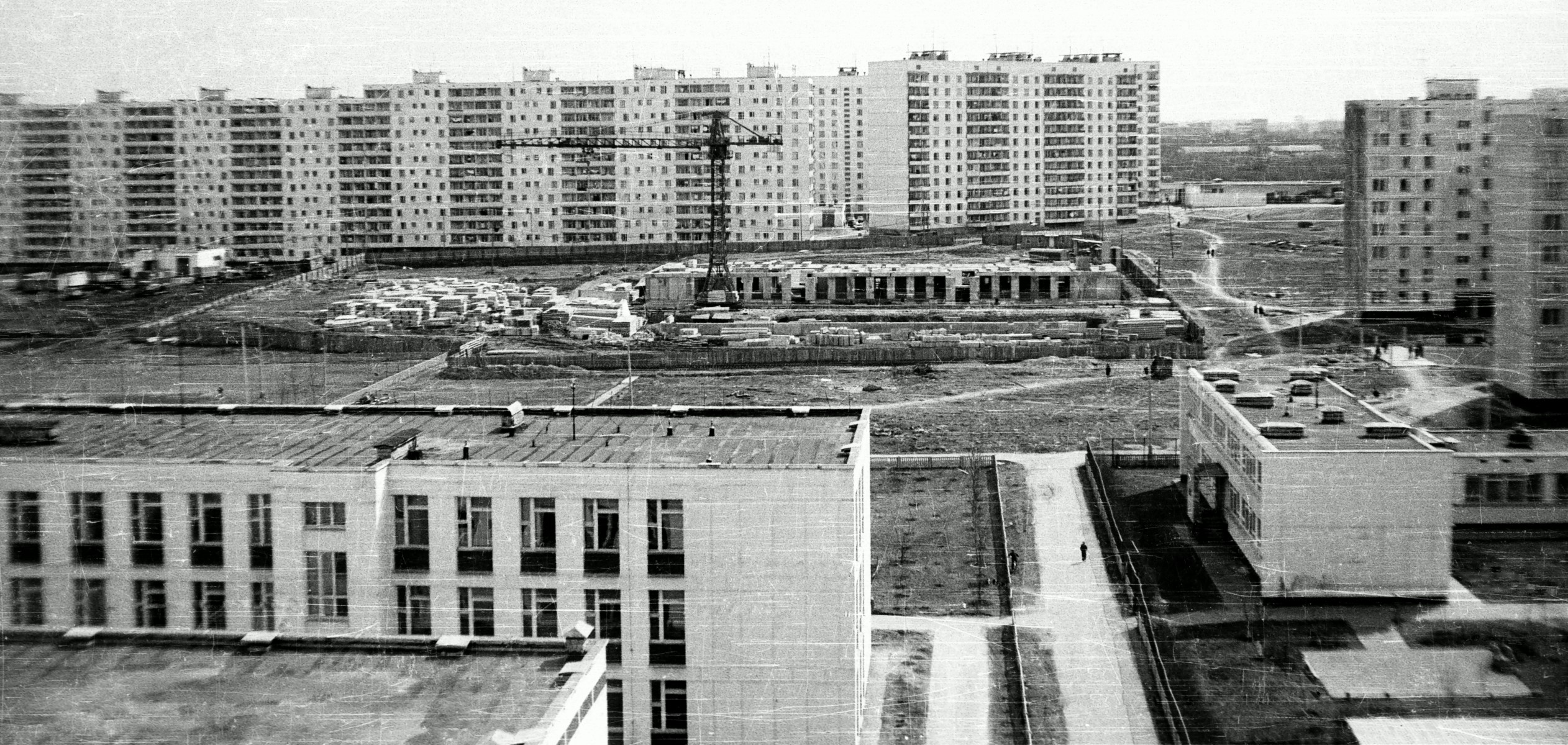 Школа № 856 и строительство дворца пионеров в 1976 году